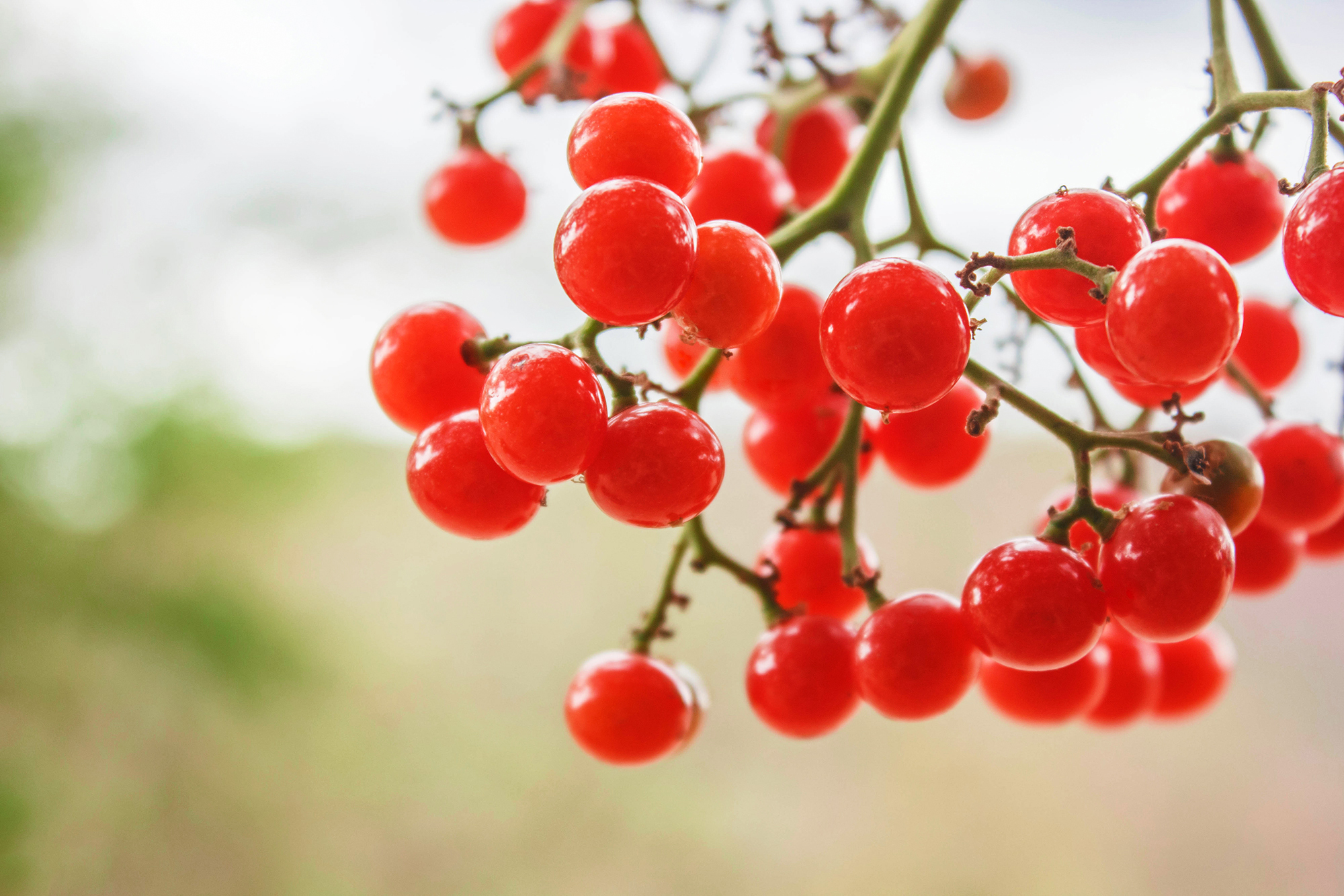 Maracay.